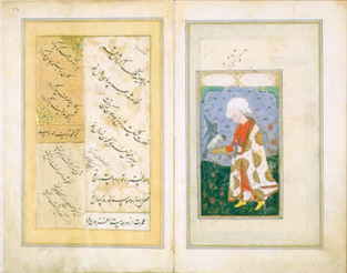 Osmanische Weltgeschichte mit Porträts um 1595-1597, Bagdad, osmanisch, Handschrift, Papier, 17 Blätter, fol. 16v/17r; Size 25,5 cm x 17,5 cm Manuscript in the Badische Landesbibliothek, Karlsruhe, Germany